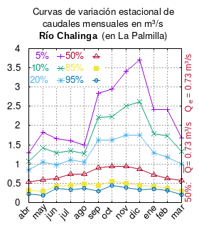 Caudales medios mensuales del rio Chalinga en La Palmilla. # cita publicación # | apellido = Dirección General de Aguas # | nombre = # | enlace-autor = Ministerio de Obras Públicas (Chile) # | título = Diagnóstico y clasificación de los cursos y cuerpos de agua según objetivos de calidad. Cuenca del río Choapa # | ubicación = Santiago de Chile # | editorial = Ministerio de Obras Públicas (Chile) # | año = 2004 # | edición = # | url = # | ref = harv # Tabla 4.5: Río Chalinga en la Palmilla (m3/s) p.46 mes 5% 10% 20% 50% 85% 95% abr 1.297 1.066 0.841 0.534 0.305 0.220 may 1.825 1.421 1.049 0.588 0.288 0.189 jun 1.653 1.293 0.980 0.626 0.424 0.366 jul 1.609 1.353 1.097 0.734 0.448 0.335 ago 1.485 1.273 1.056 0.740 0.477 0.369 sep 2.834 2.203 1.624 0.906 0.442 0.290 oct 2.947 2.234 1.621 0.932 0.548 0.439 nov 3.401 2.506 1.753 0.935 0.501 0.384 dic 3.696 2.622 1.755 0.871 0.445 0.339 ene 2.409 1.797 1.282 0.724 0.430 0.350 feb 2.414 1.726 1.177 0.630 0.373 0.312 mar 1.682 1.329 1.000 0.580 0.297 0.200